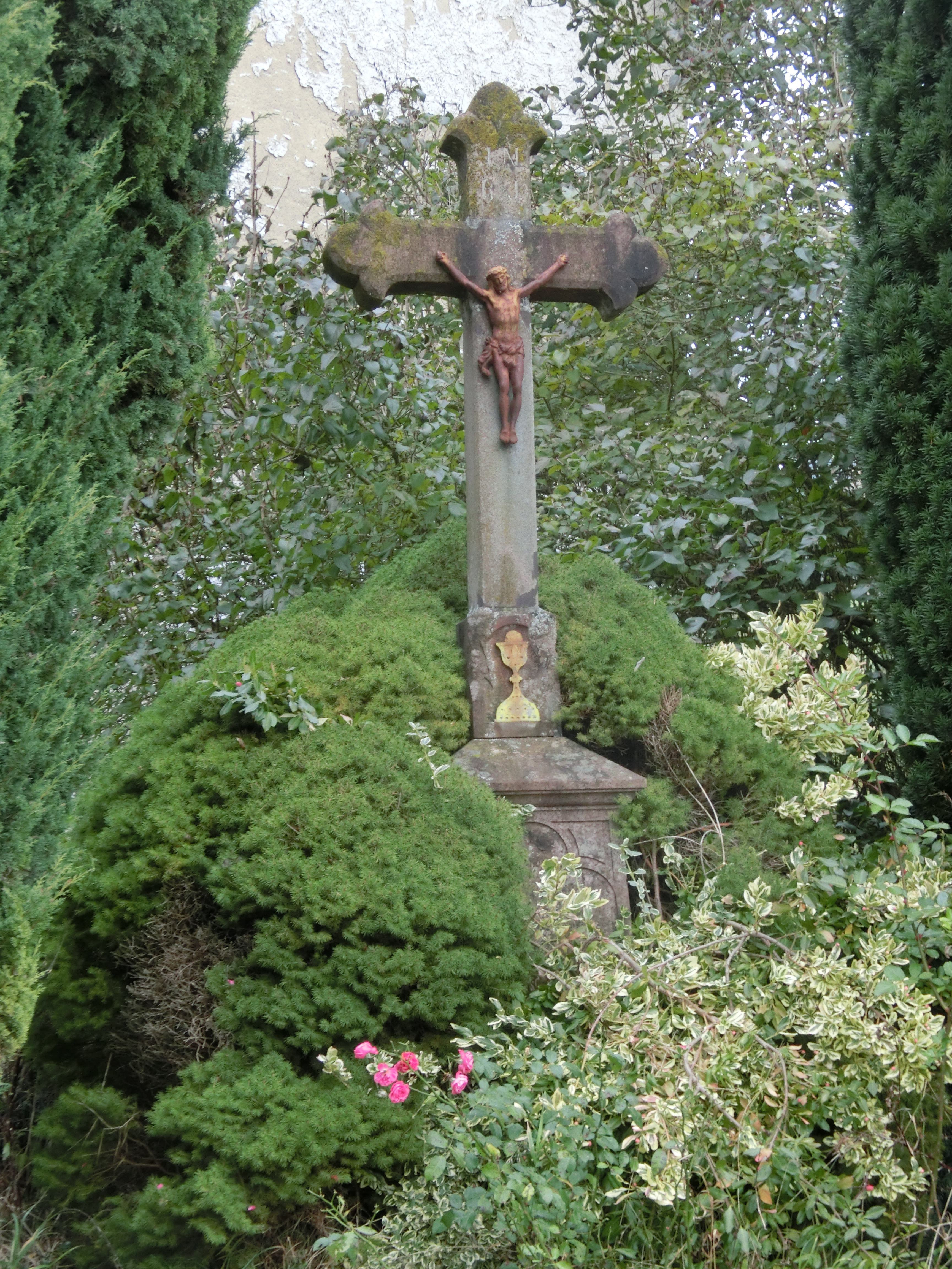 Deutschland (D) - Baden-Württemberg (BW) - Landkreis Konstanz (KN) - Mühlingen, Ortsteil Schwackenreute: Flurkreuz an der Ortsstraße